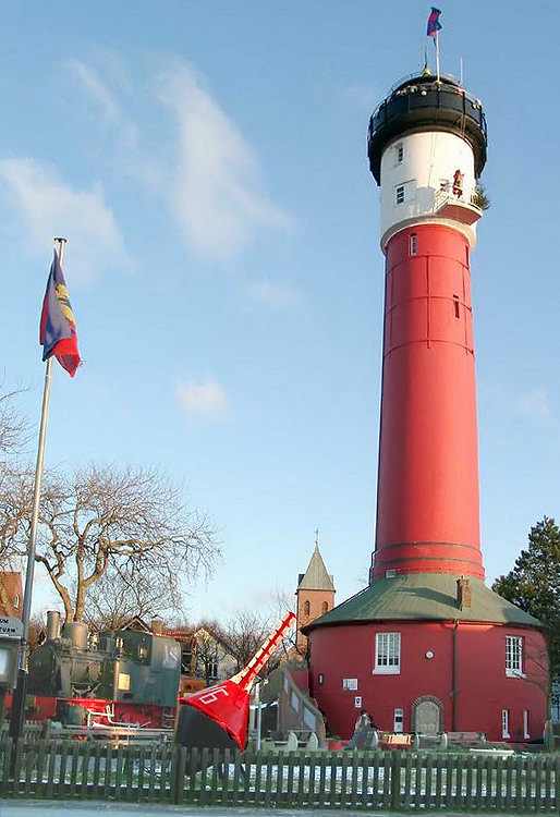 Alter Leuchtturm von Wangerooge Bildqualität verbessert von Benutzer:Axel Hindemith 23.08.05 u. a. durch perspektivische Entzerrung